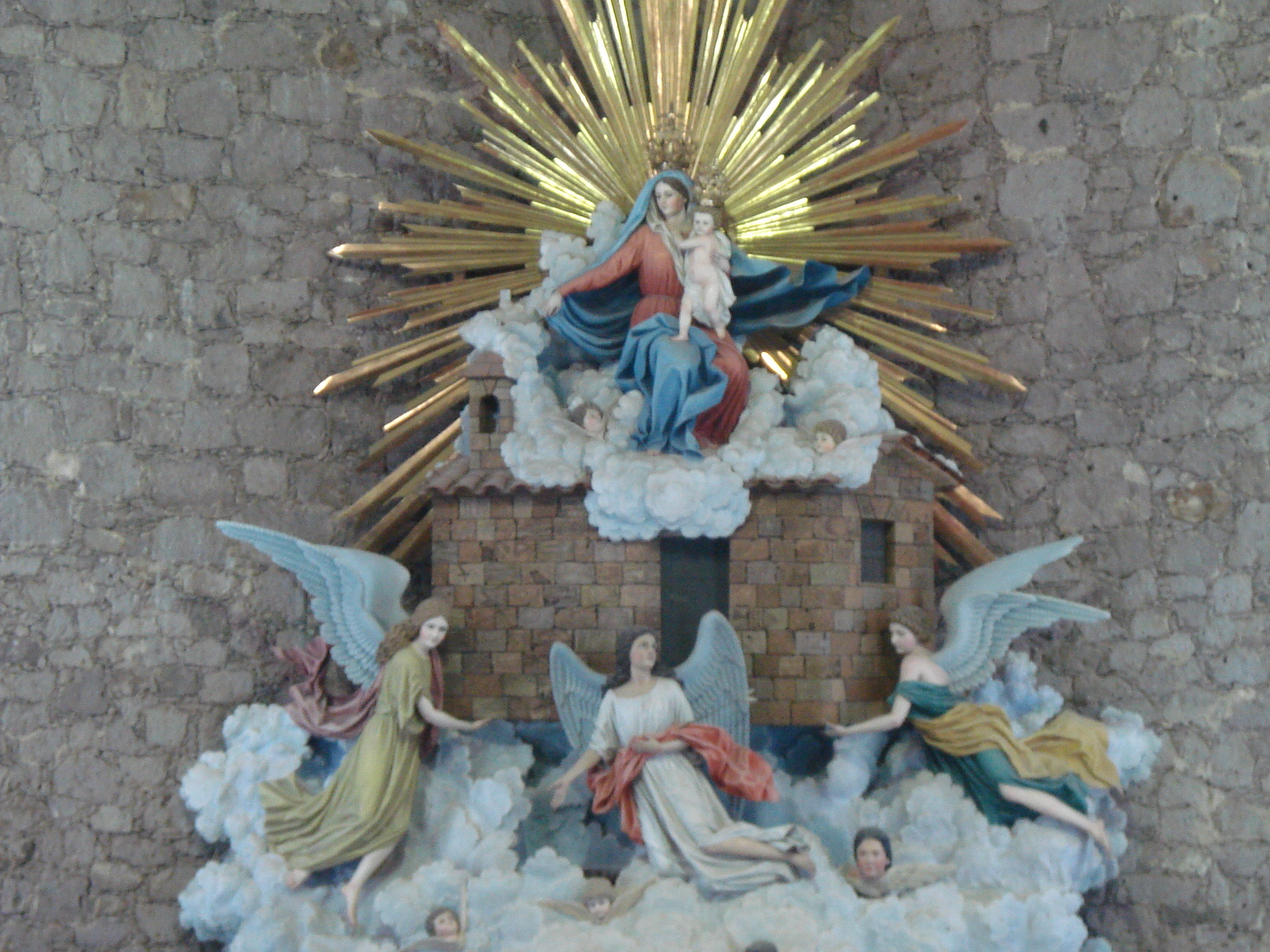 Nuestra señora y reina de Loreto, en Loreto, Zacatecas